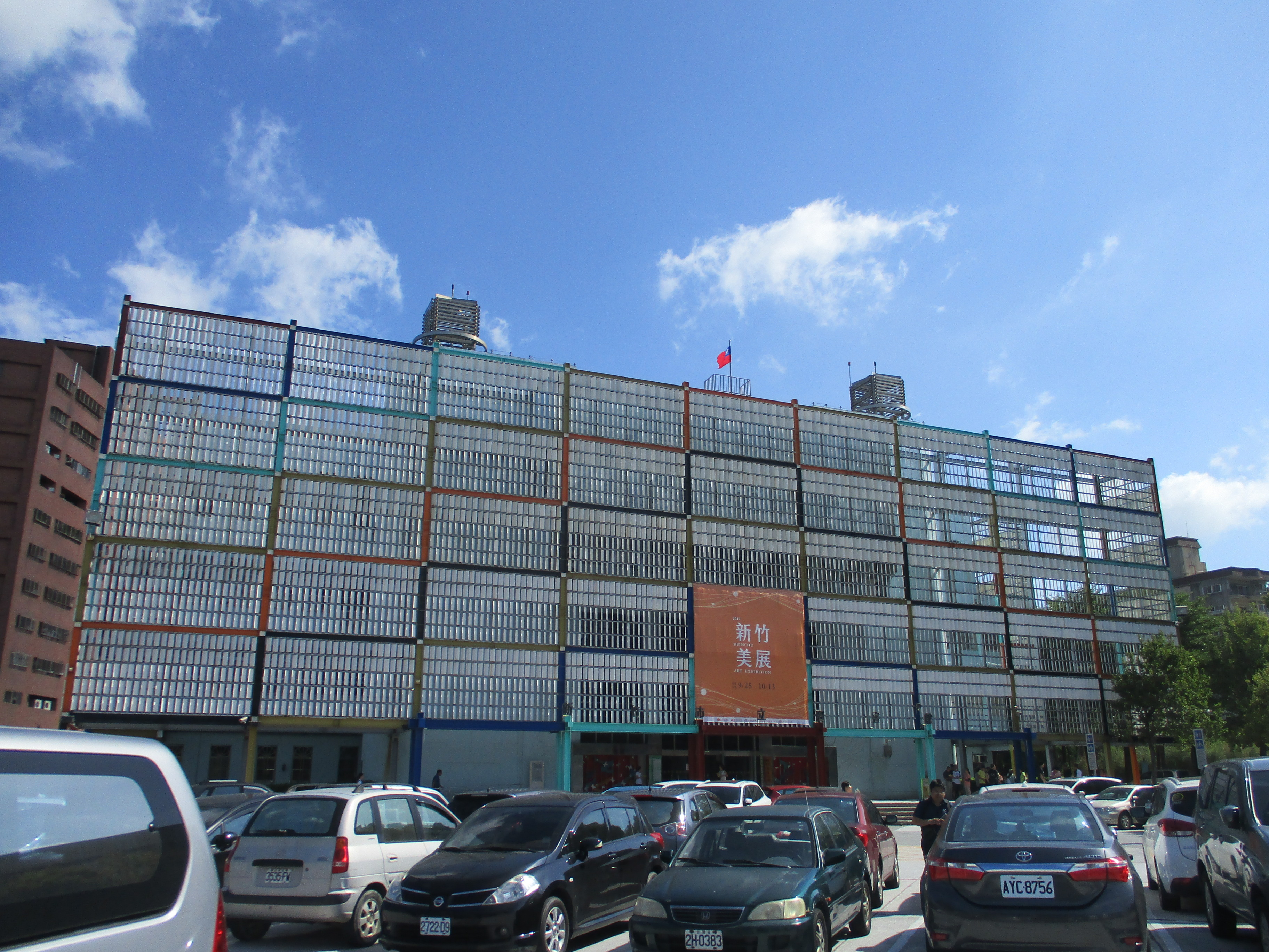 新竹市圖書館總圖